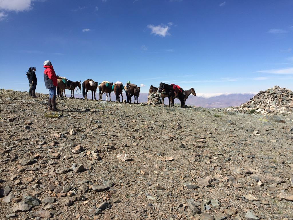 Monumento cultural. lugares